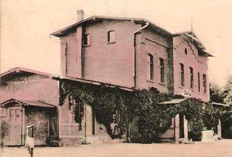 Biała. Hotel w Rynku i dworzec kolejowy.